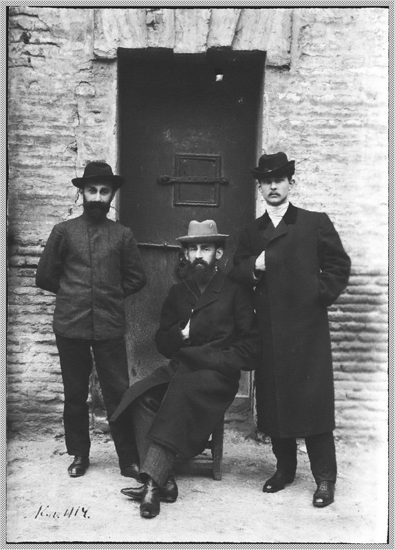 ბენია ჩხიკვიშვილი ციხეში